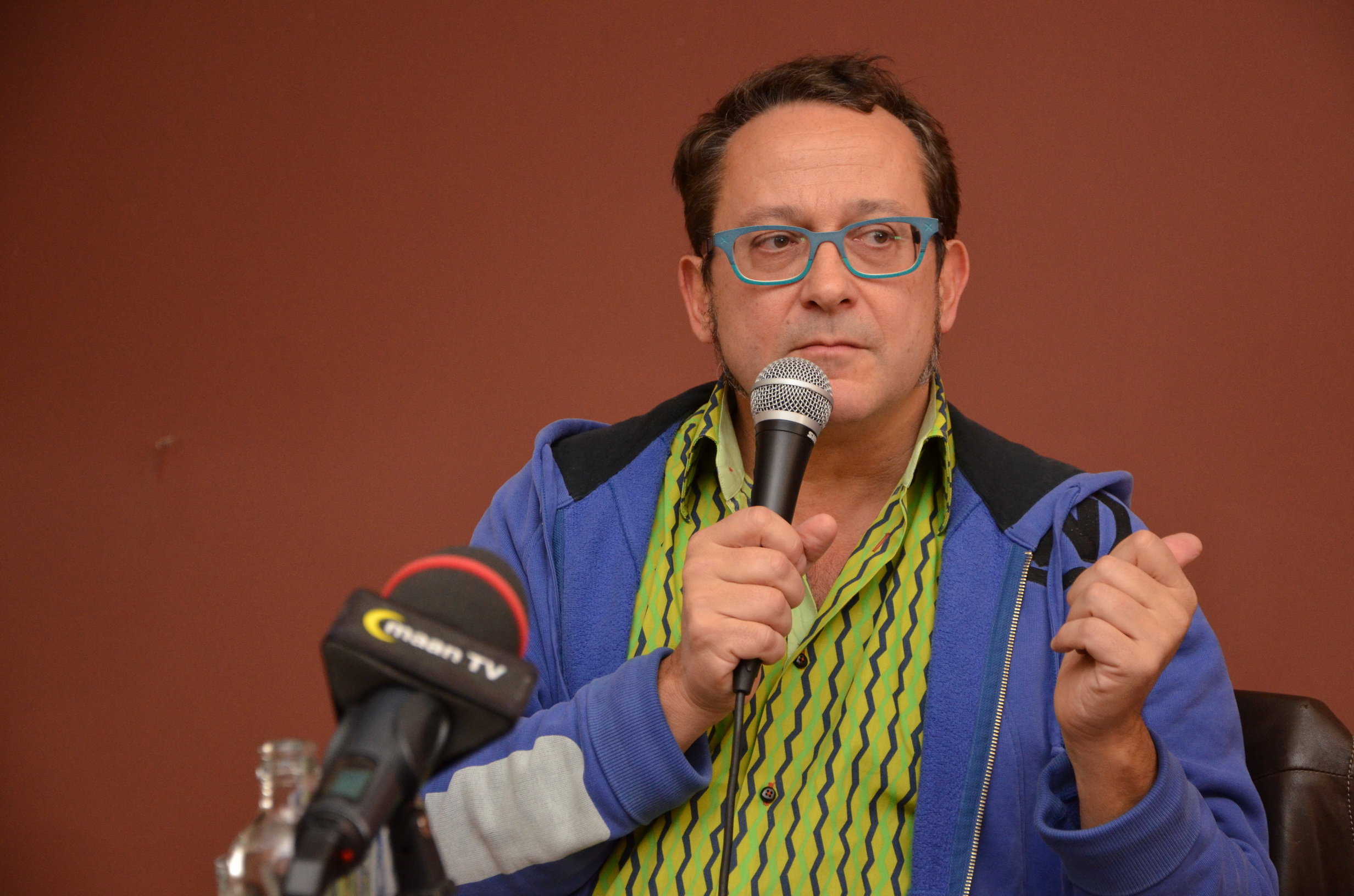 Vlaams schrijver Tom Lanoye tijdens een lees- en signeersessie in boekhandel De Zondvloed te Mechelen op 28-09-2013